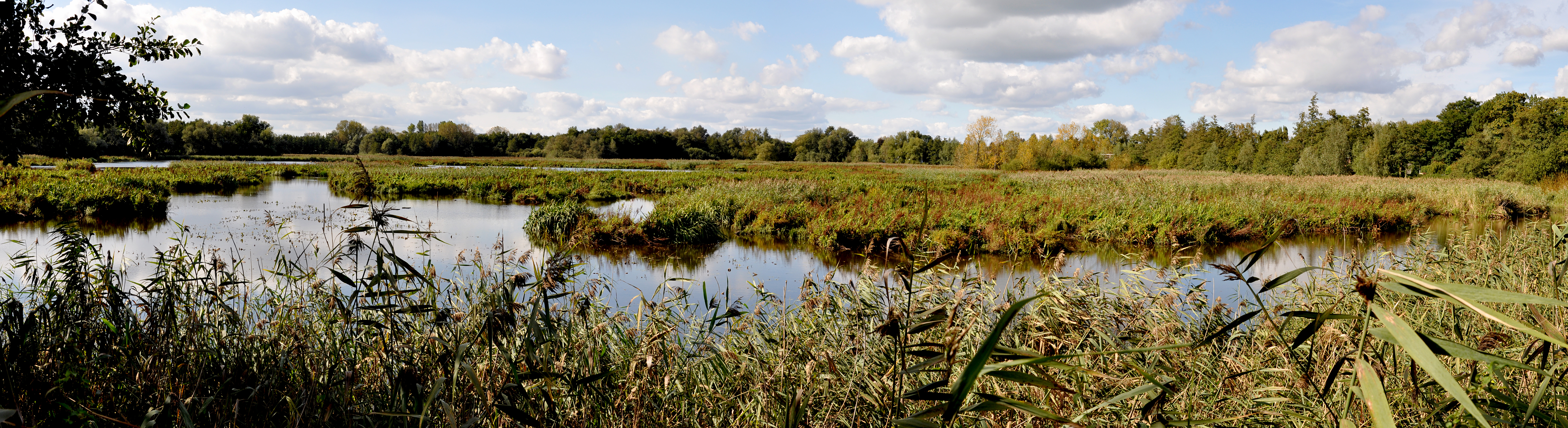 Panorama Molsbroek, Lokeren